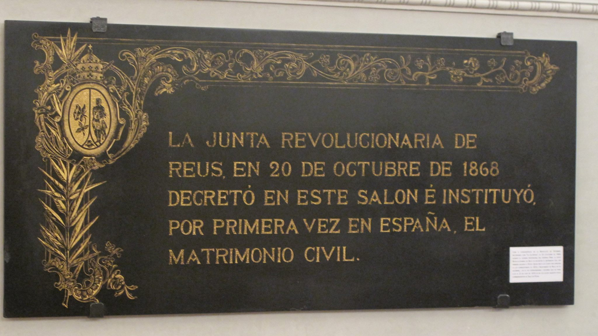 Fotografia de la placa commemorativa del primer matrimoni civil celebrat a Reus el 1868